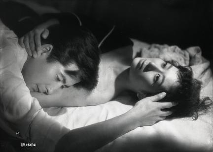 『乳房よ永遠なれ』（1955年）のスチル写真、月丘夢路・葉山良二。